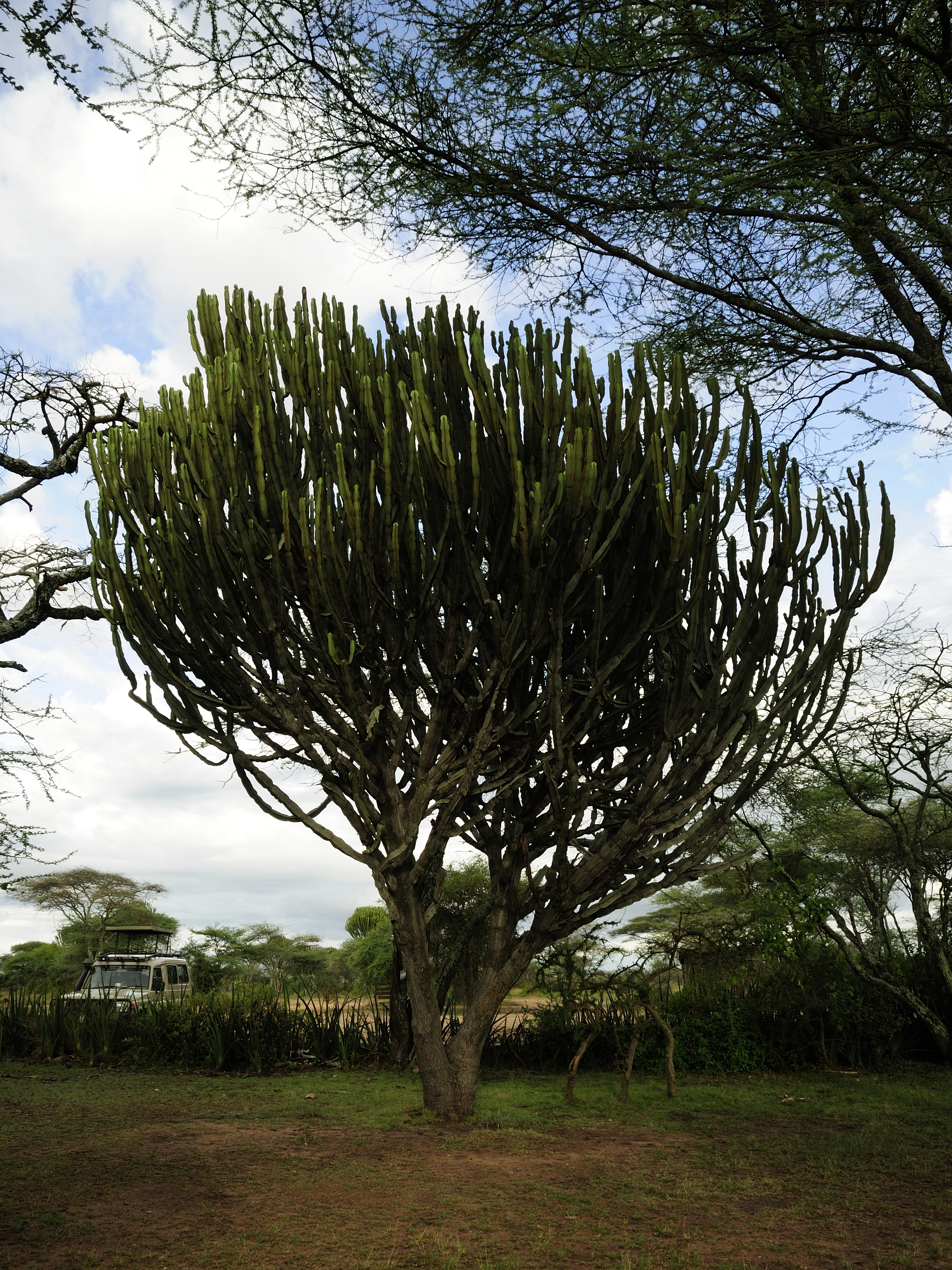 Euphorbia candelabrum, Serengeti, Tanzania